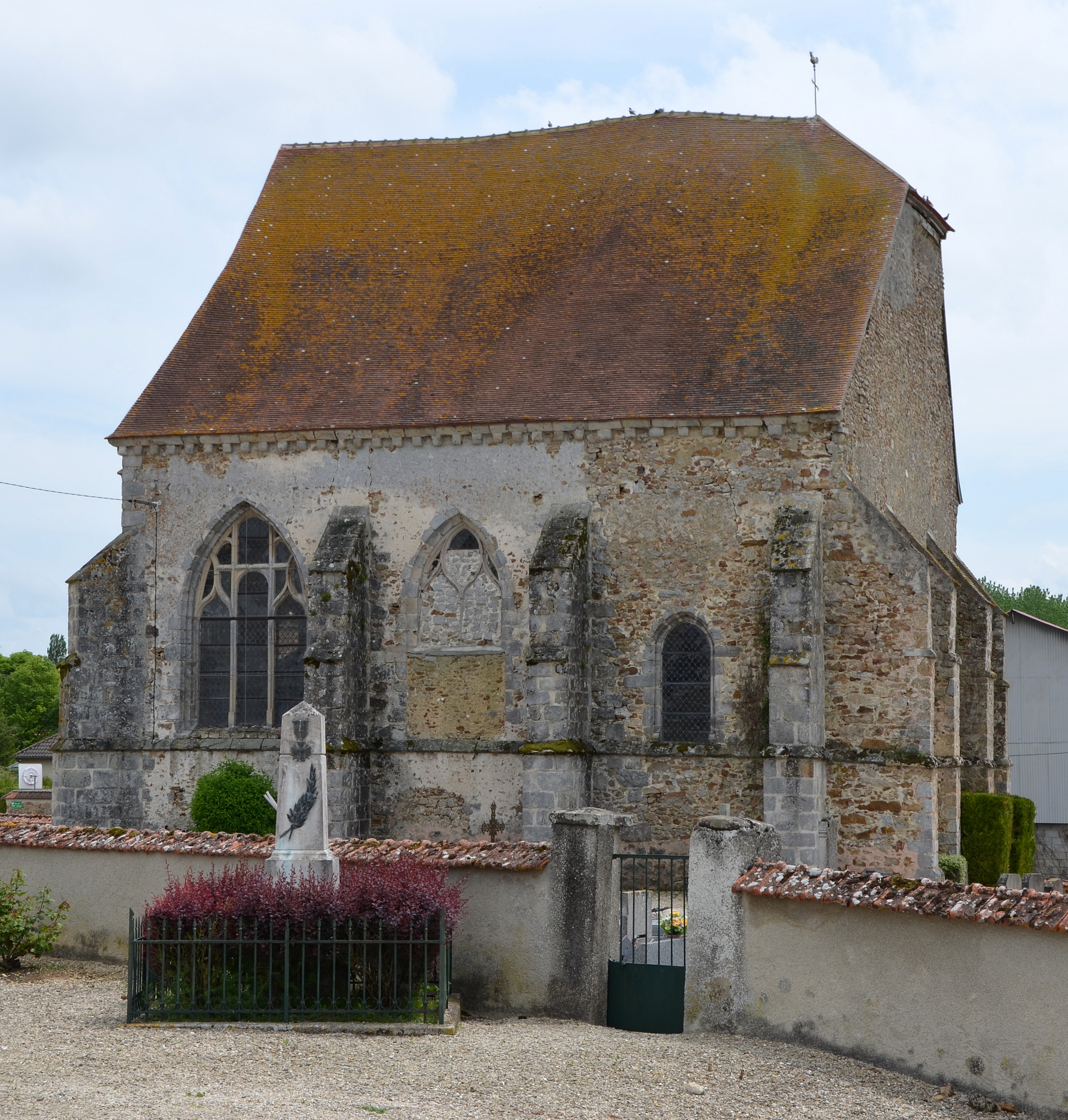 Eglise de Potangis, Marne, France